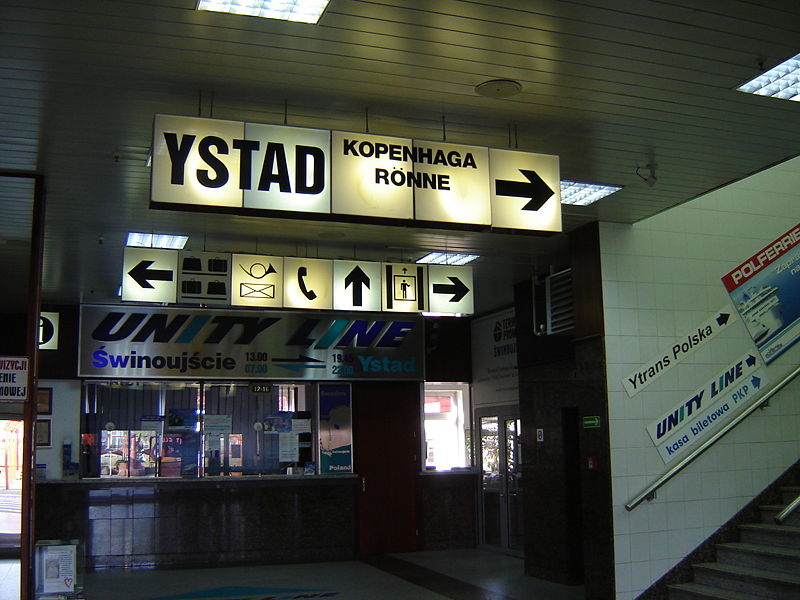 Widok Widok terminalu wewnątrz budynku